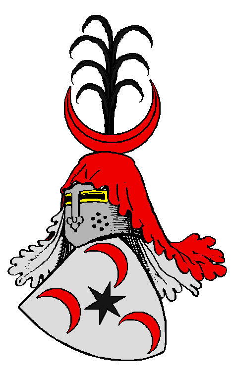 Stammwappen der Hund von Saulheim, ein seit um 1300 urk., 1750 erloschenes rheinhessisches Adelsgeschlecht mit Stammsitz in Saulheim.